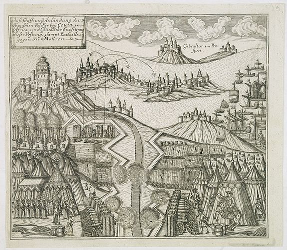 Sitio de Ceuta de 1419. En ella se encuentra el siguiente texto: Template:Cita La imagen fue publicada en: Allgemeine Welt-Chronik oder neue und wichtige Zeit-Geschichte aller Länder und Völker. 1805.